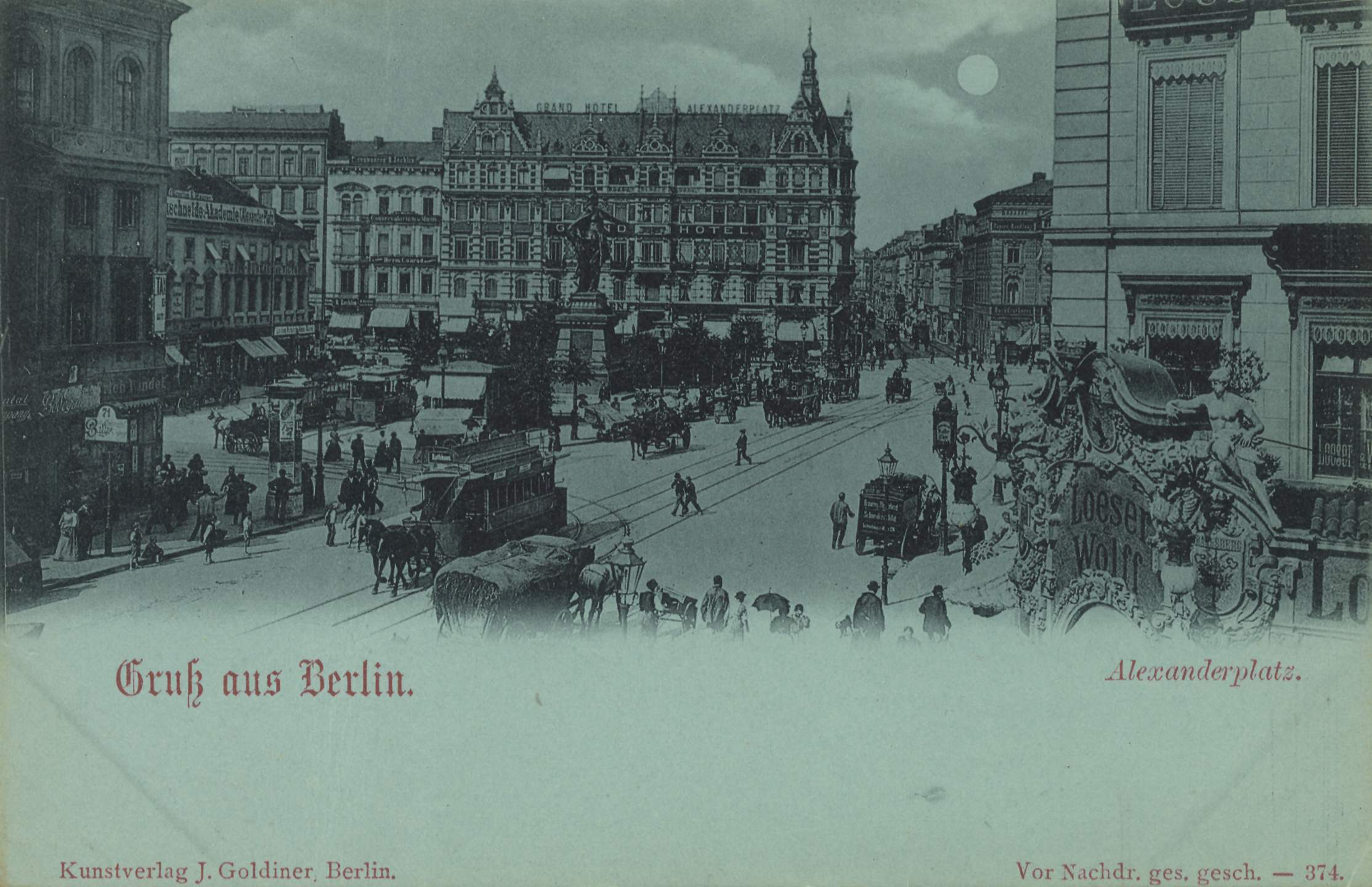 Das Grand-Hôtel Alexanderplatz in Berlin-Mitte. Ganz rechts ist der Hauptsitz der Tabakwarenfabrik Loeser & Wolff zu sehen.